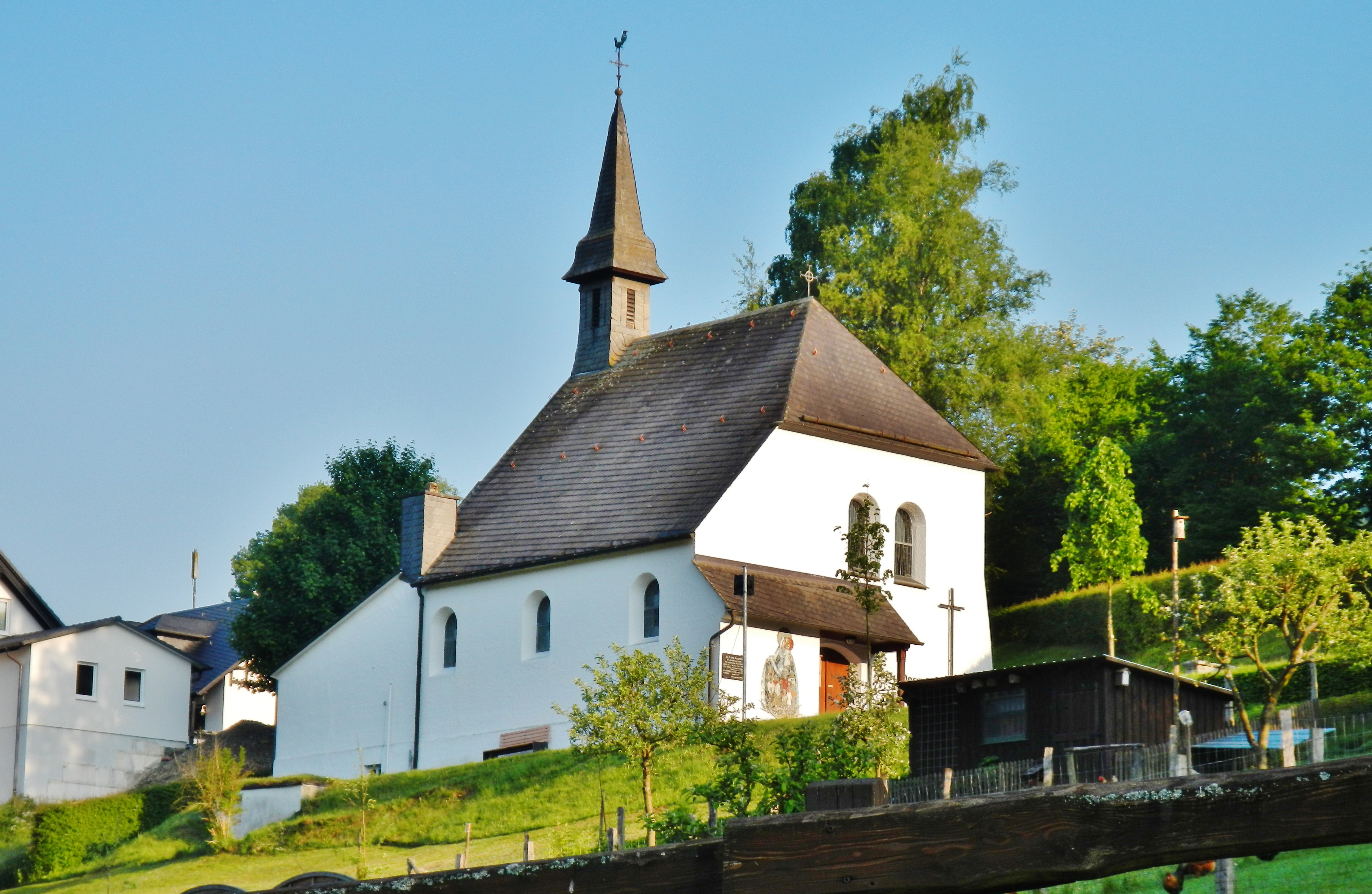 St. Josef Kapelle, in Schmallenberg-Latrop, Filialkirche der Kath. Kirchengemeinde Grafschaft (1906-1907) vom Dombaumeister zu Aachen (Prof. Josef Buchkremer)